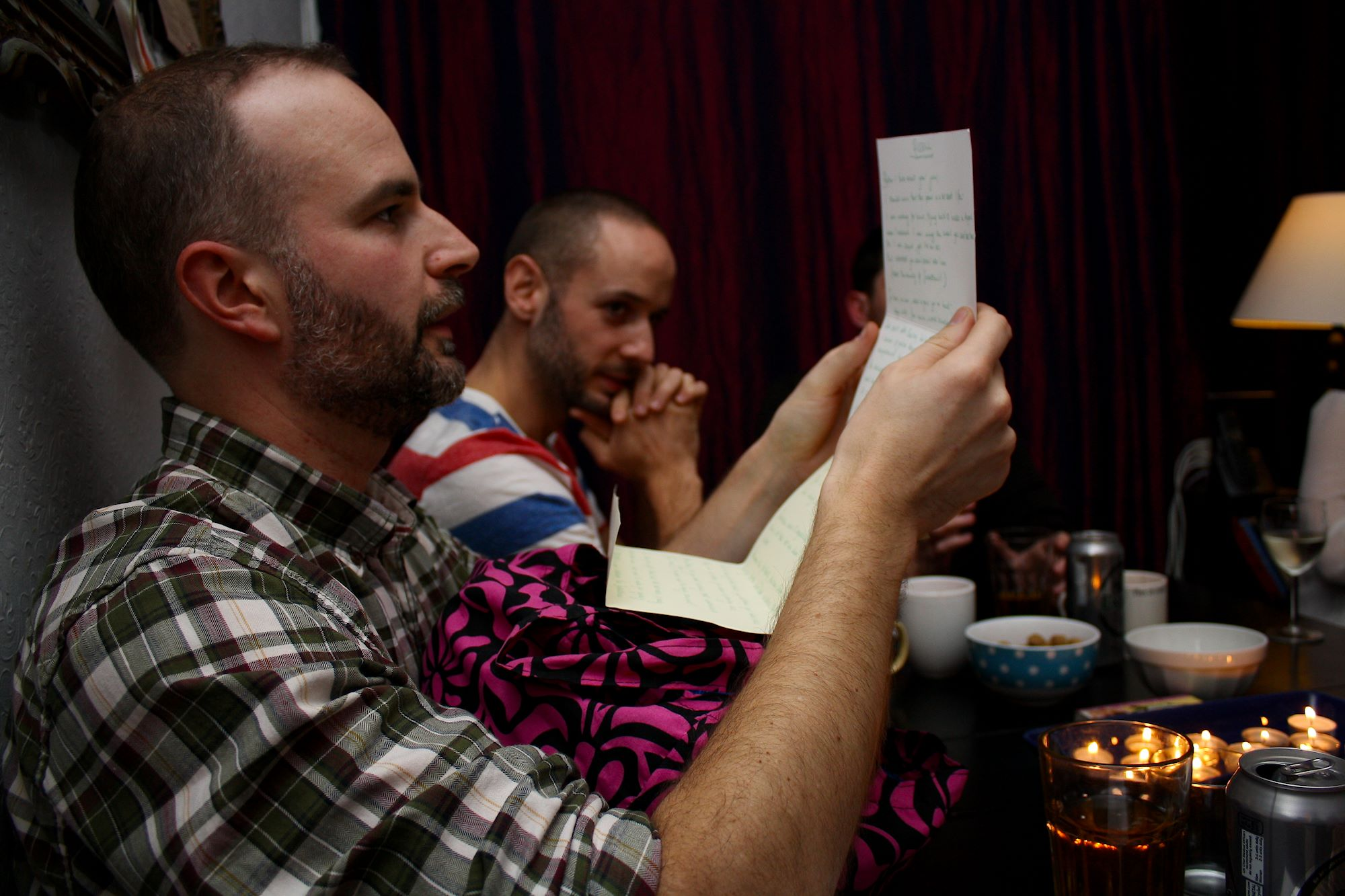 Sinterklaas 2013